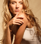 Summer Watson